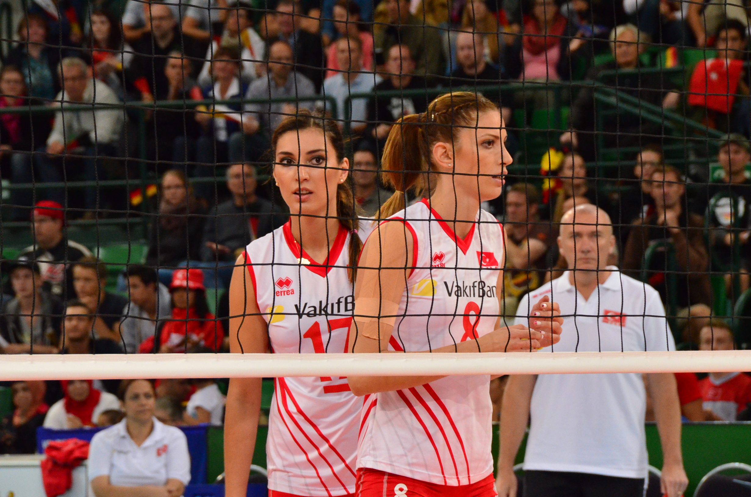 Volleyball-Europameisterschaft der Frauen 2013-Spielort Halle (Westf) Gerry-Weber-Stadion - Spiel 8. September 2013 (Deutschland-Türkei)